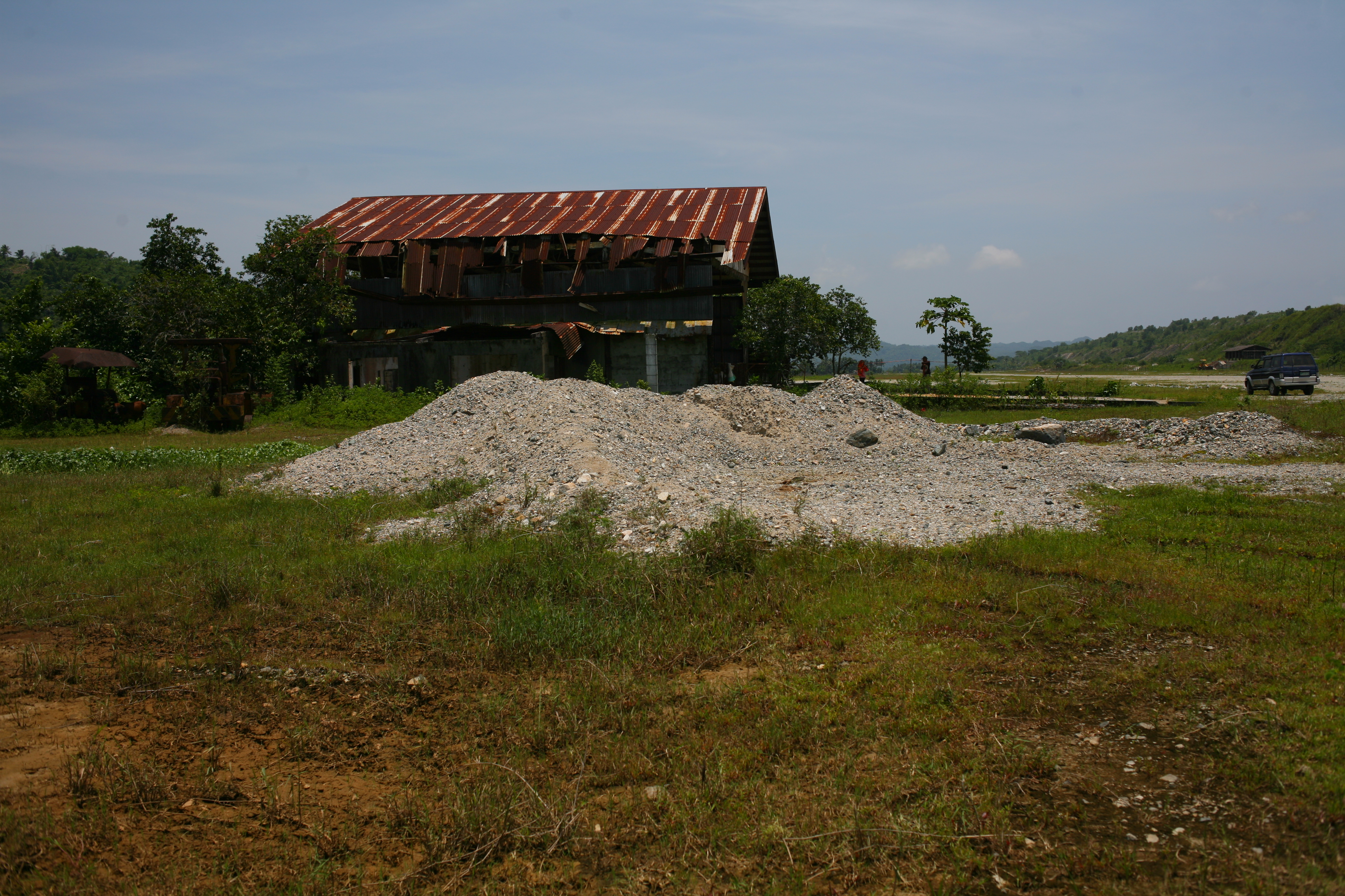 Hangar dell'abbandonato aeroporto di Sipalay, Negros Occidental, Filippine